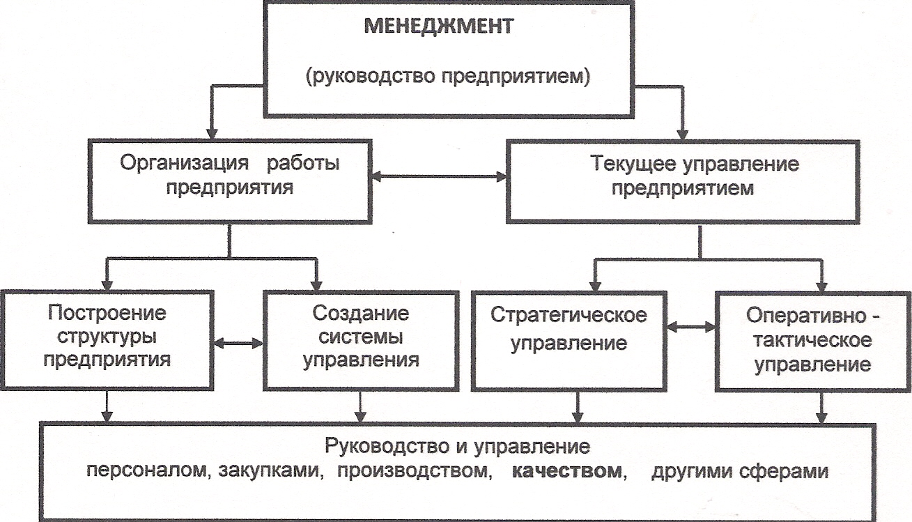 Структура менеджмента (руководства предприятием)предусматривает организацию работ и текущее управление предприятием, включая управление качеством.